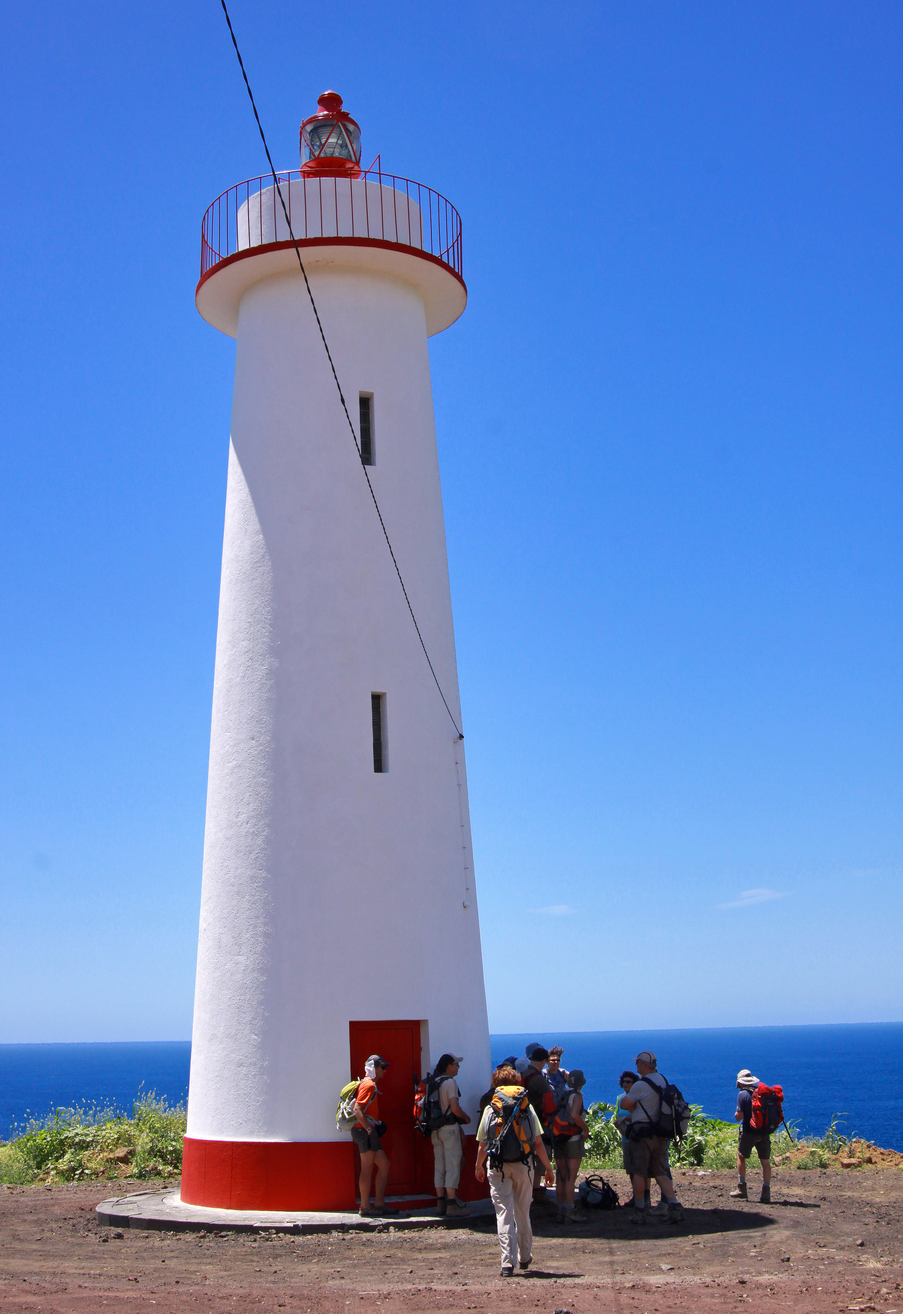 Farol de Vale Formoso, Ilha do Faial, Açores. Entre la Ponta dos Capelinhos et Varadouro.